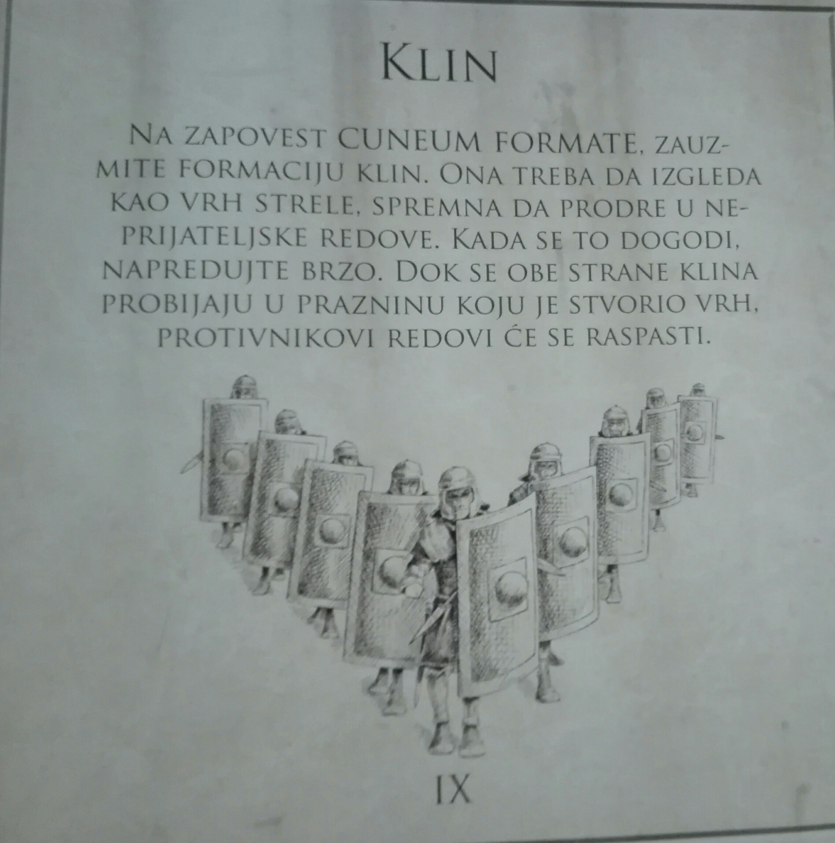 Формација римске војске клин